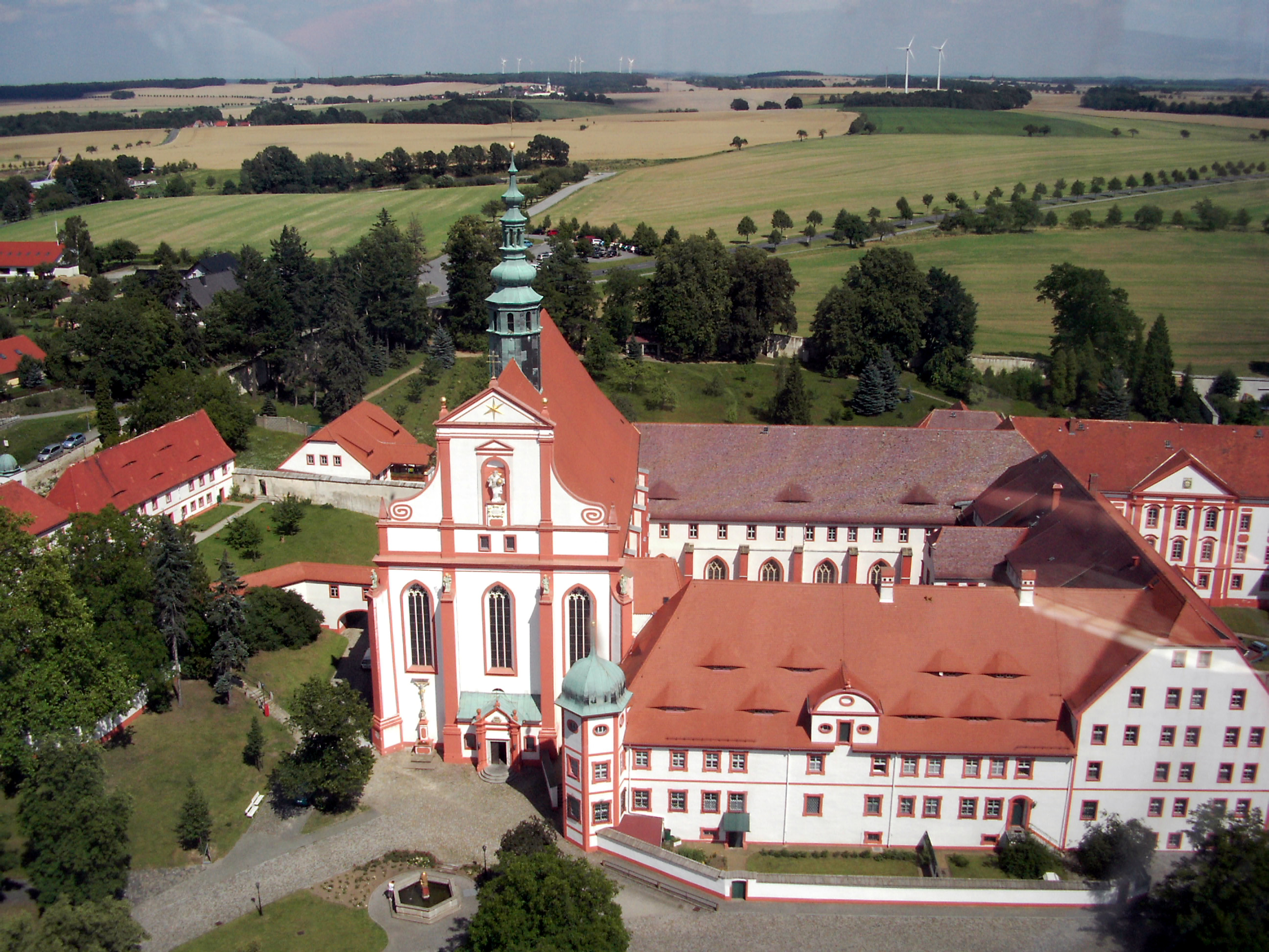 Vista de pájaro en el monasterio cisterciense St. Marienstern, Panschwitz-Kuckau, Alemania